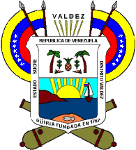 Escudo del municipio Valdez. Estado Sucre. Venezuela